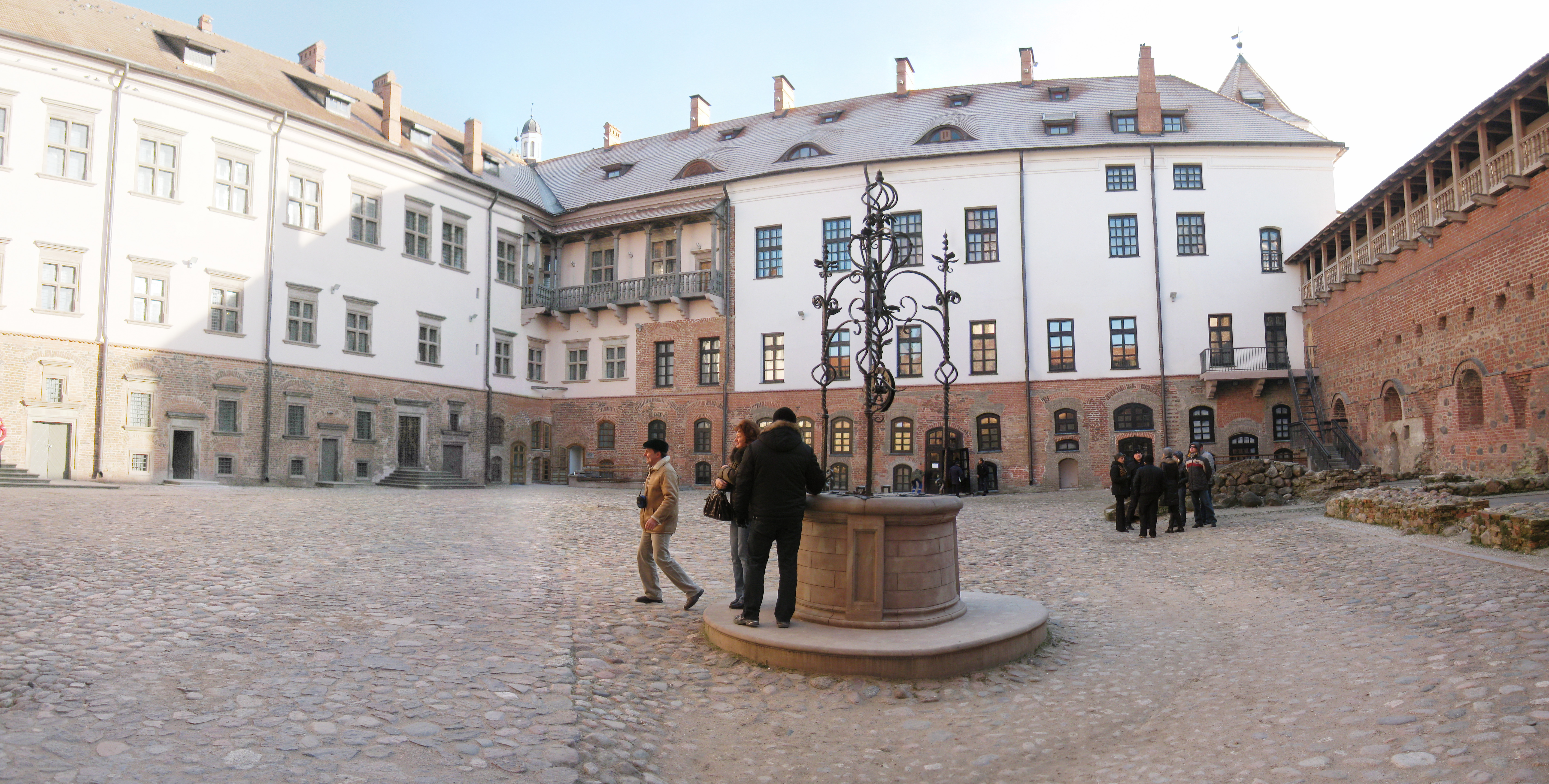 Беларуская (тарашкевіца): Замкавы комплекс «Мір». Будынкі, збудаваньні, пляніровачная структура, ляндшафтныя кампазыцыі, рэшткі земляных абарончых збудаваньняў, элемэнты абвадненьня. г.п. Мір This is a photo of Belarusian heritage monument. Reference number: 410Г000317 ( WLM)